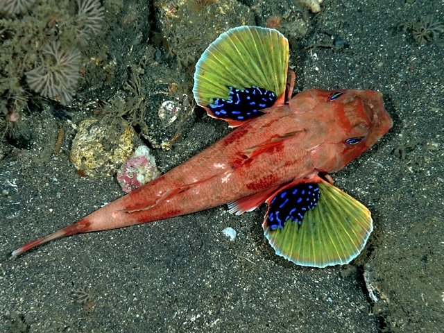 カナド Lepidotrigla guentheri